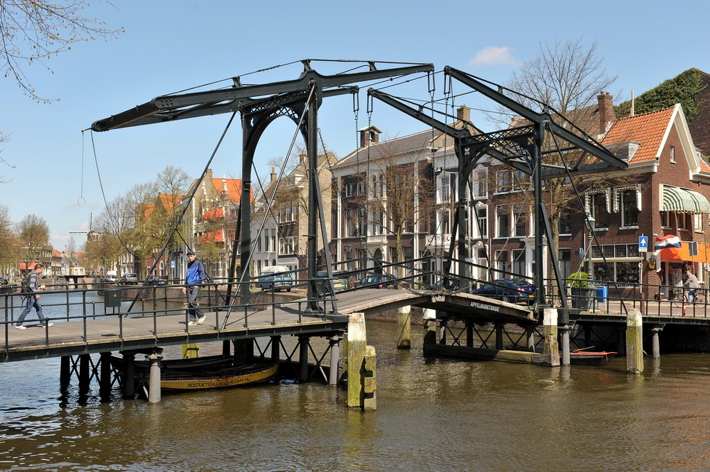 E�n van de drie gietijzeren ophaalbruggen van Schiedam, gebouwd rond 1860. Wanneer een boot door de haven vaart, wordt deze brug door twee brugwachters met de hand omhoog getrokken.